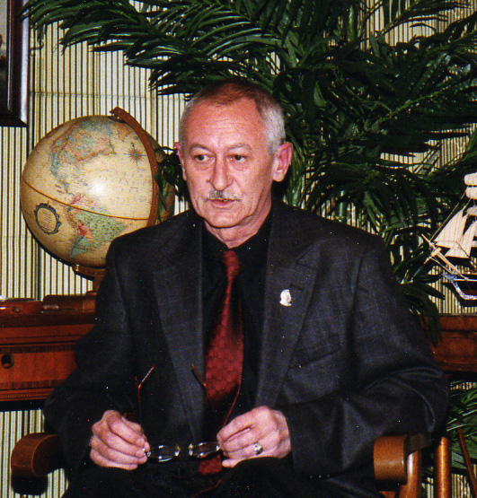 Belissarius - polski wikipedysta